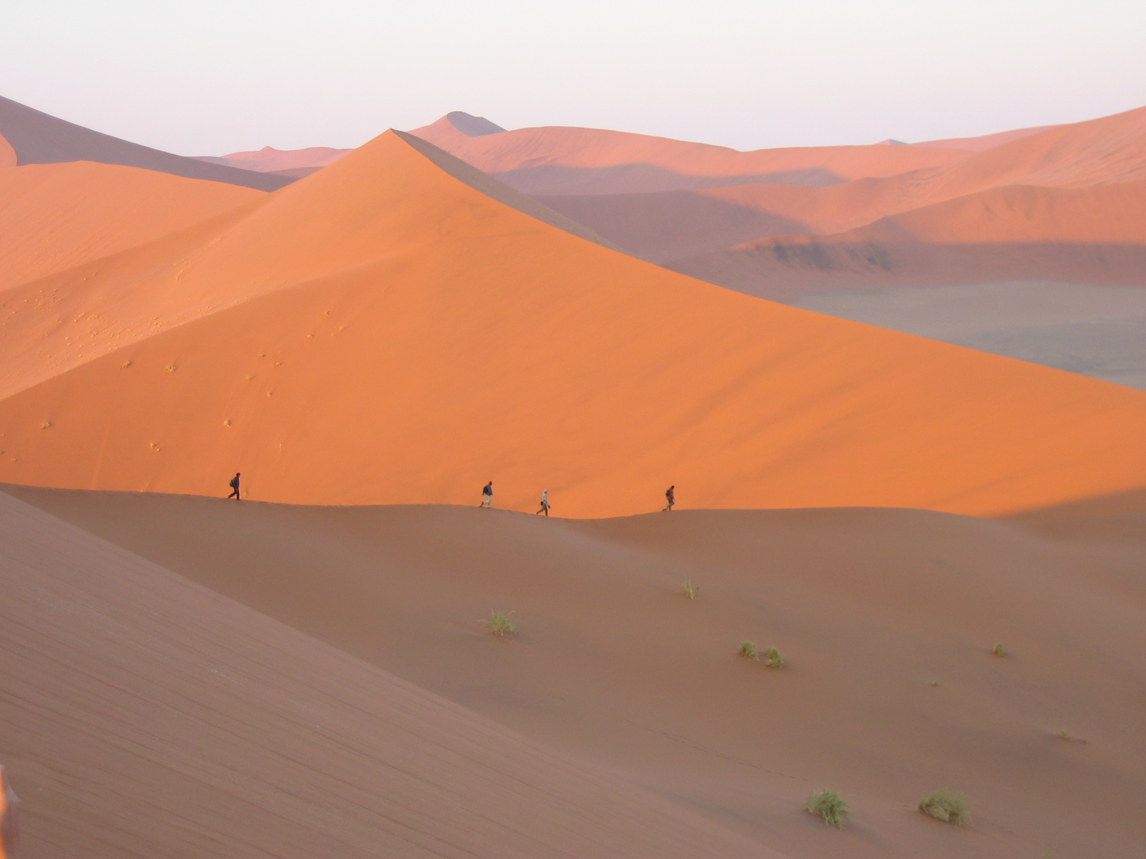 Dune45 Sossusvlei Namib-woestijn.Eigen foto- Mhwater (zomer 2005)